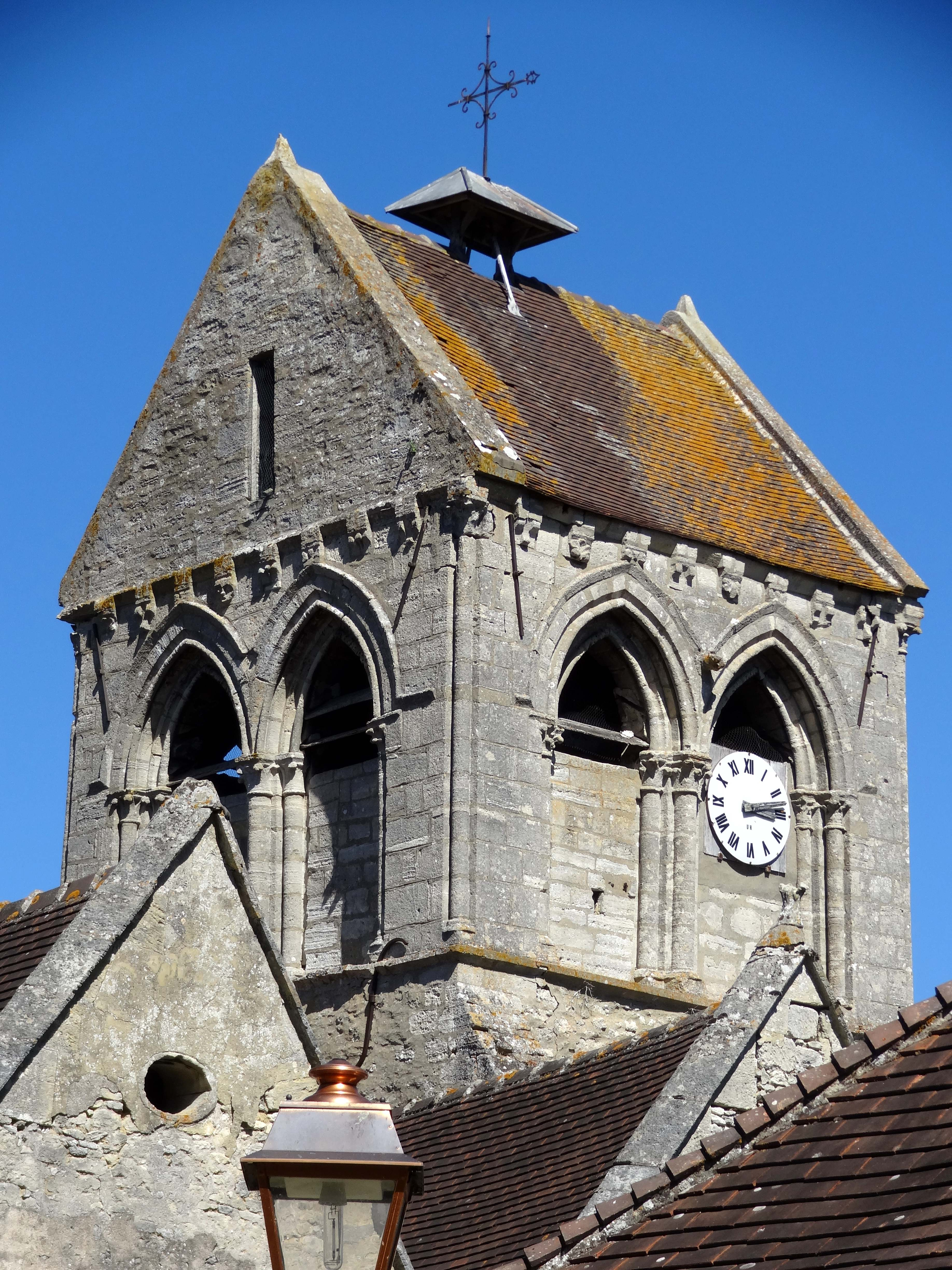 Église Saint-Gervais-et-Saint-Protais de Vaudancourt - voir titre.